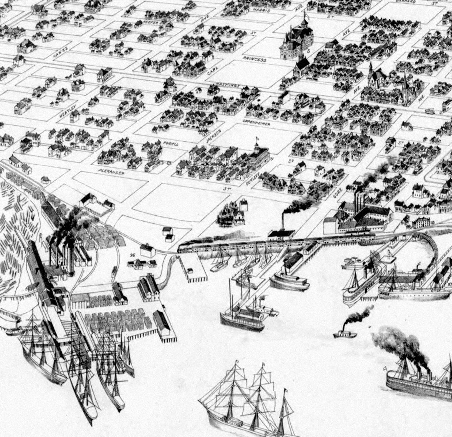 Hastings Mill (detail)